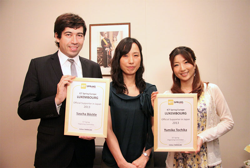 ICT Spring 2013 オフィシャルサポーター